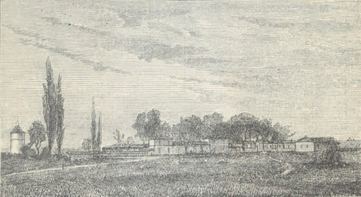 Illustration du Château La Tour Blanche dans l'ouvrage Bordeaux et ses vins (7ème édition) de Charles Cocks et Edouard Féret publié en 1898